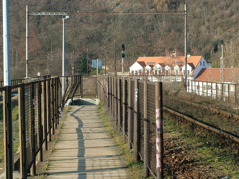 Lávka pro pěší ve střední části mostu